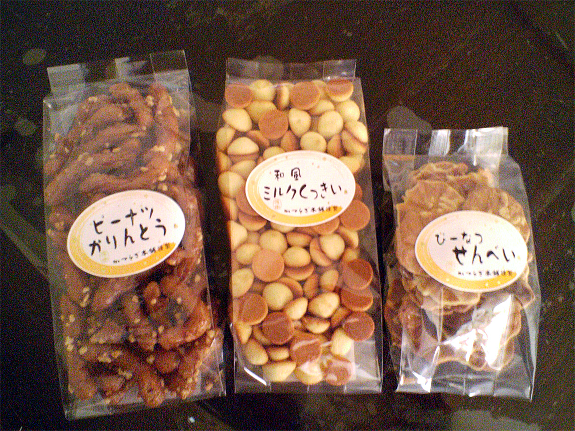 投稿者自身が『株式会社かつらぎ本舗』 （大阪府和泉市九鬼町676-2）の製品を撮影。